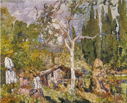 Potamos on Corfu